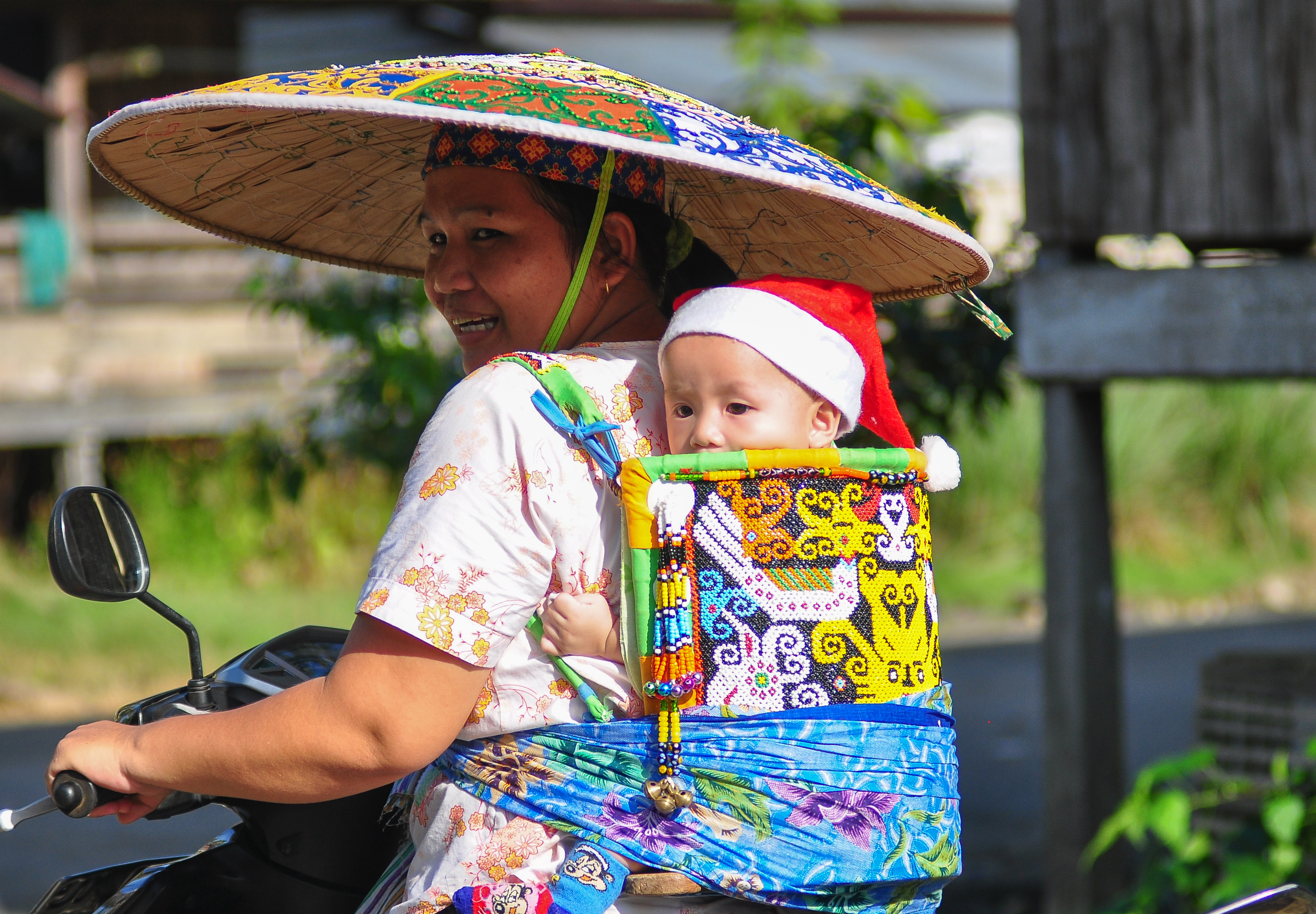 Bening Dayak gendingan bayi